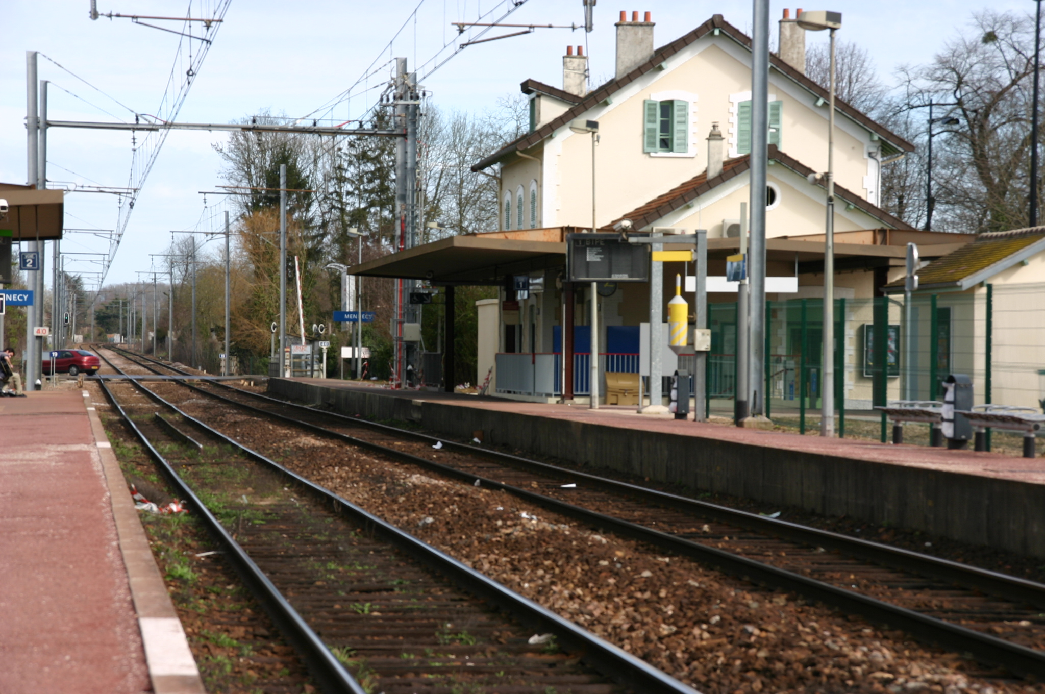 La gare de Mennecy, Mennecy, département de l'Essonne (France)